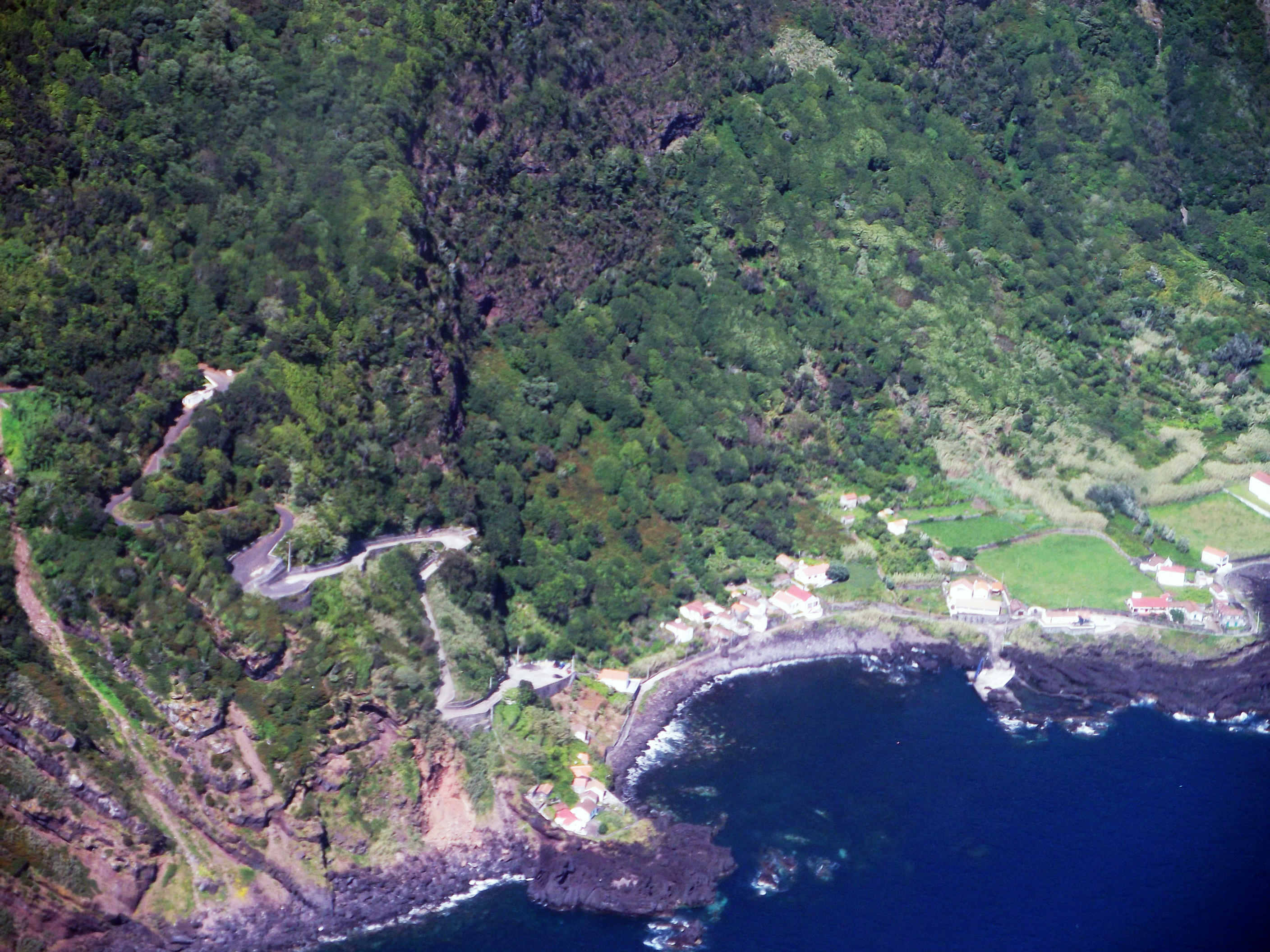 Fajã das Almas, vista parcial, ilha de São Jorge, Açores, Portugal